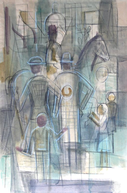 Titel: Reiter in der Stadt. Mischtechnik auf Papier. Maße: 750 x 500 mm